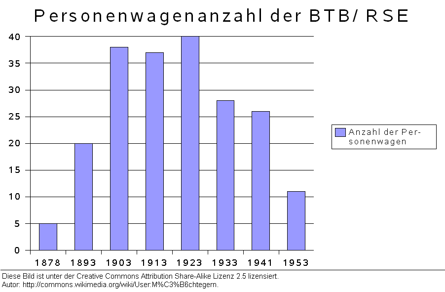 Anzahl der Personenwagen der BTB/ RSE. Quelle der Daten: Adolf Becker: Die Bröltalbahn/ Rhein-Sieg Eisenbahn. Kerstin-Verlag, Niederkassel-Mondorf 1988, ISBN 3-925250-05-0. (Hrsg.: Rhein-Sieg-Verkehrsgesellschaft mbH, Troisdorf).